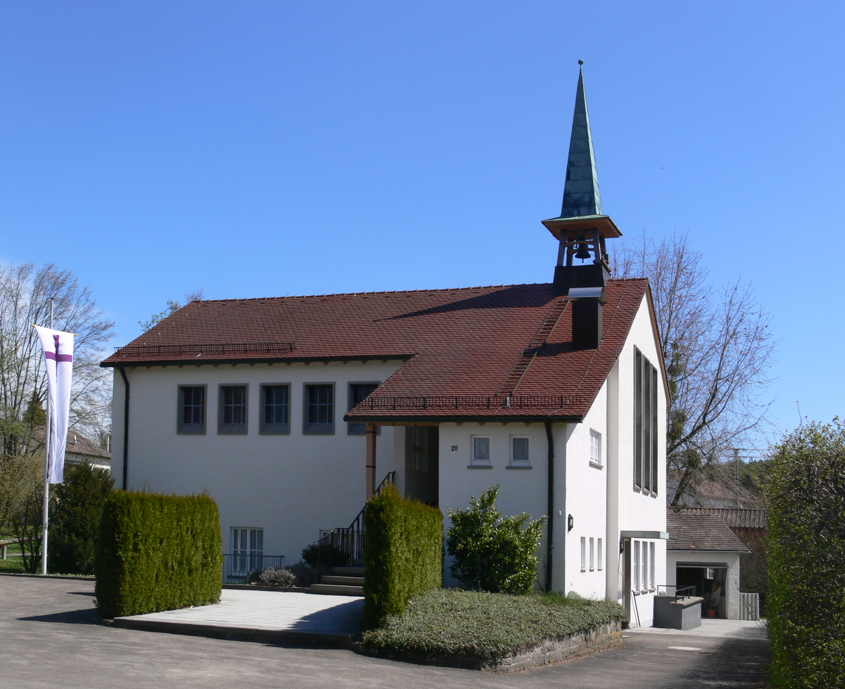 Oberteuringen, Bodenseekreis, Baden-Württemberg Evangelische Kirche